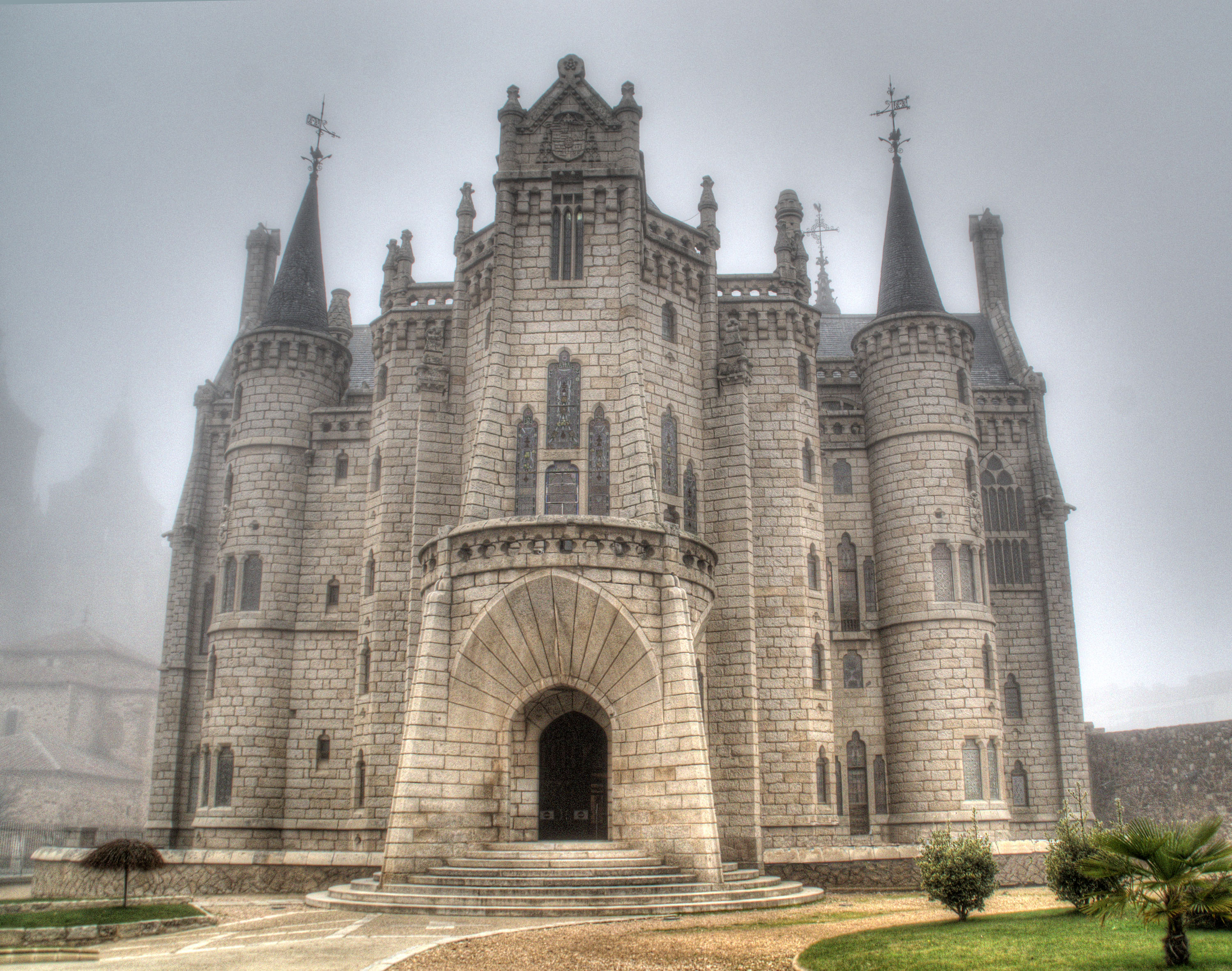 Este palacio es obra de Antonio Gaudí y se construyó entre 1889 y 1913 por encargo del obispo de Astorga al quemarse su antigua residencia.